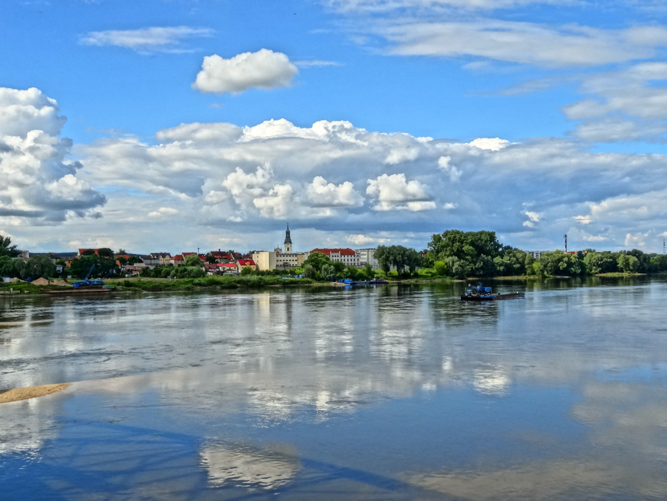 Widok Starego Fordonu (dzielnicy Bydgoszczy) od strony Wisły